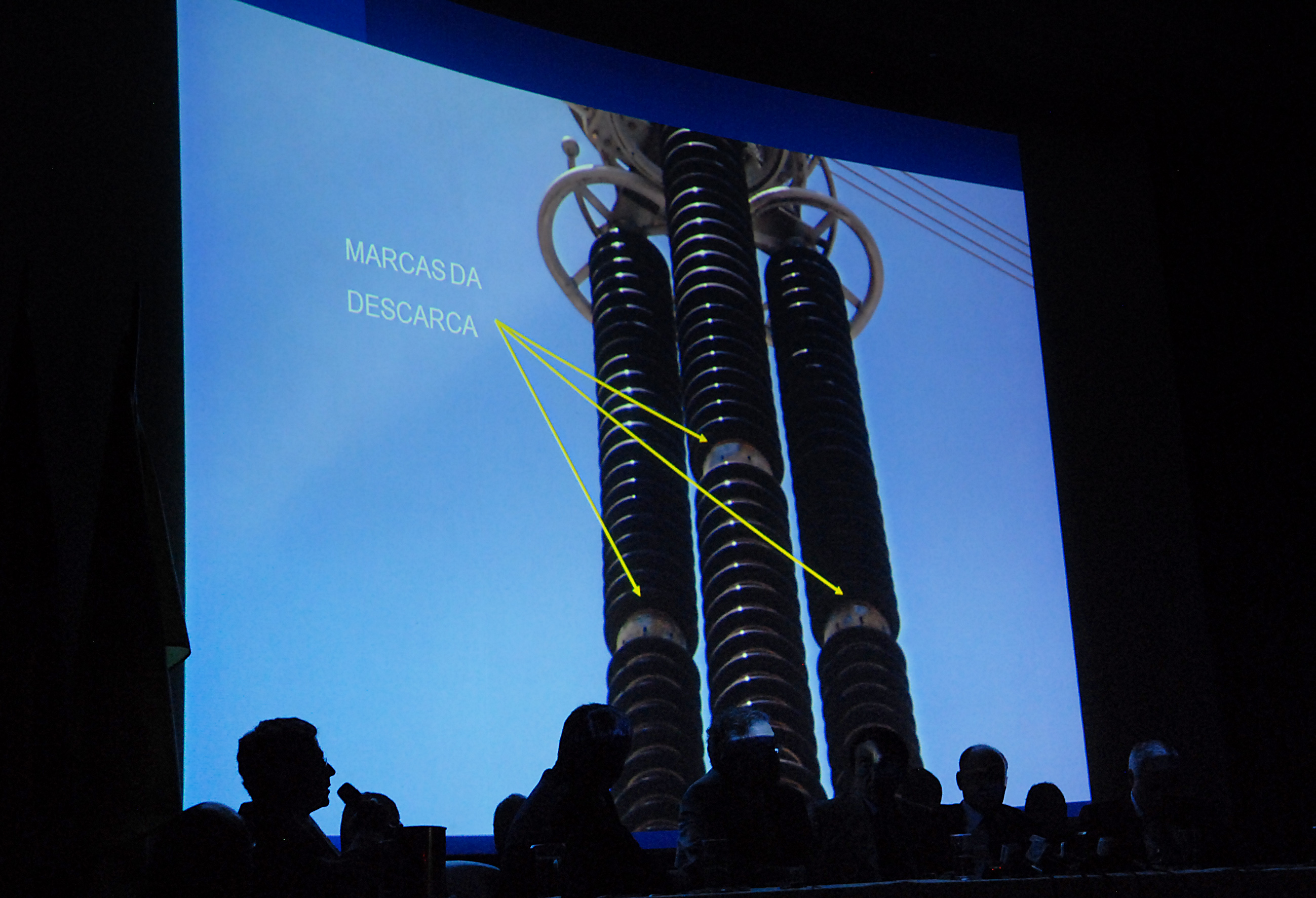 O ministro de Minas e Energia, Edison Lobão, em entrevista coletiva, disse que descargas elétricas (raios), ventos e chuvas na região de Itaberá (SP) causaram o blecaute